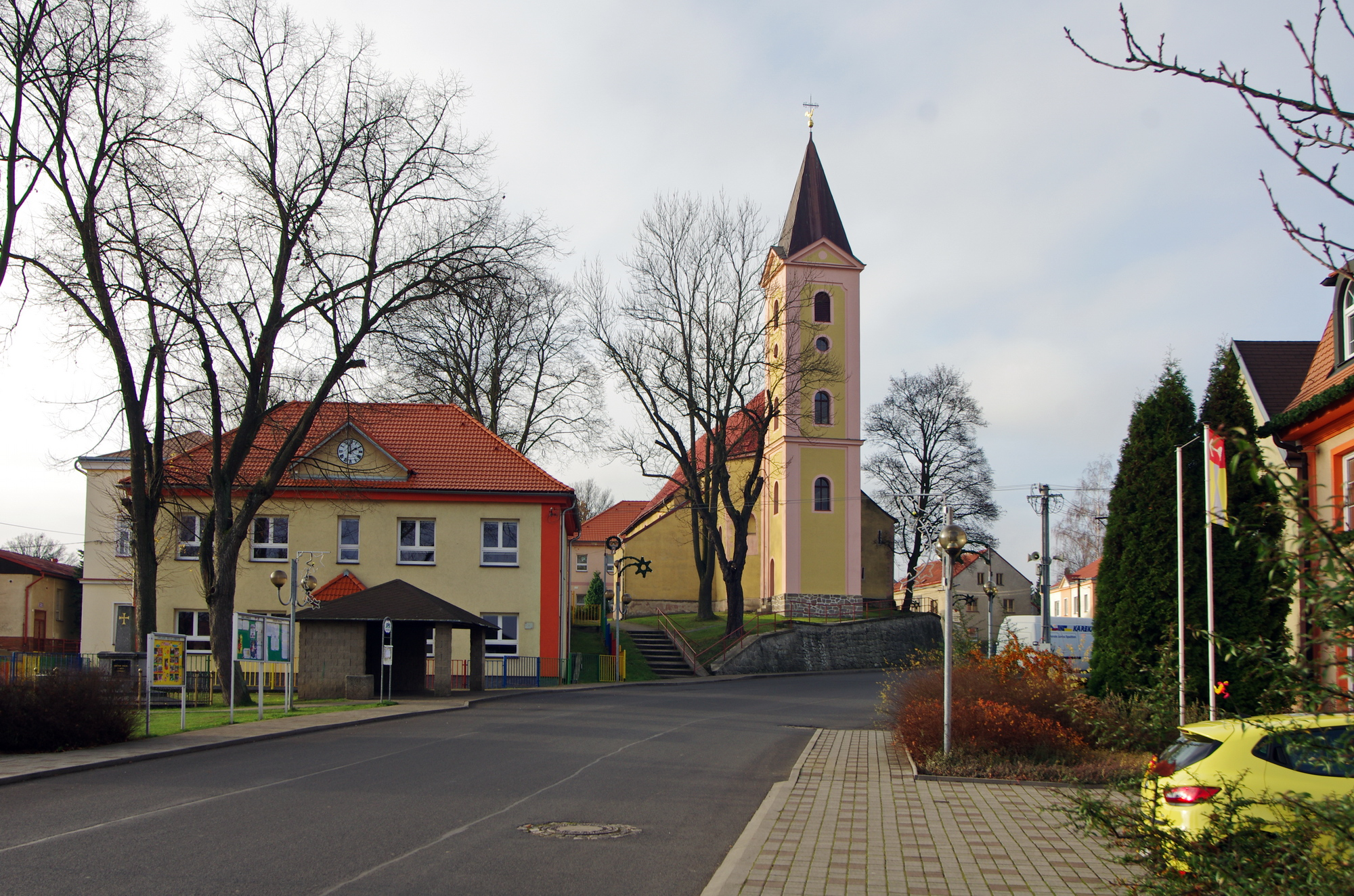 Kostel svatého Jiljí, náves, Lomnice (okres Sokolov).